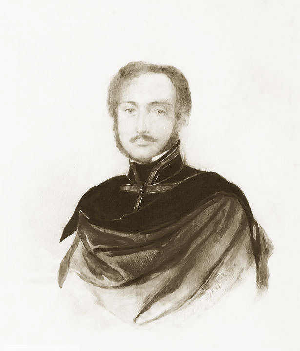 REJCHAN Alojzy, Portret Teofila Wojciecha Ostoja-Ostaszewskiego (1807-1889); akwarela, papier; 26,5 x 21,5 cm (w świetle oprawy); sygn. p. d.: Reichan f1838 (?)